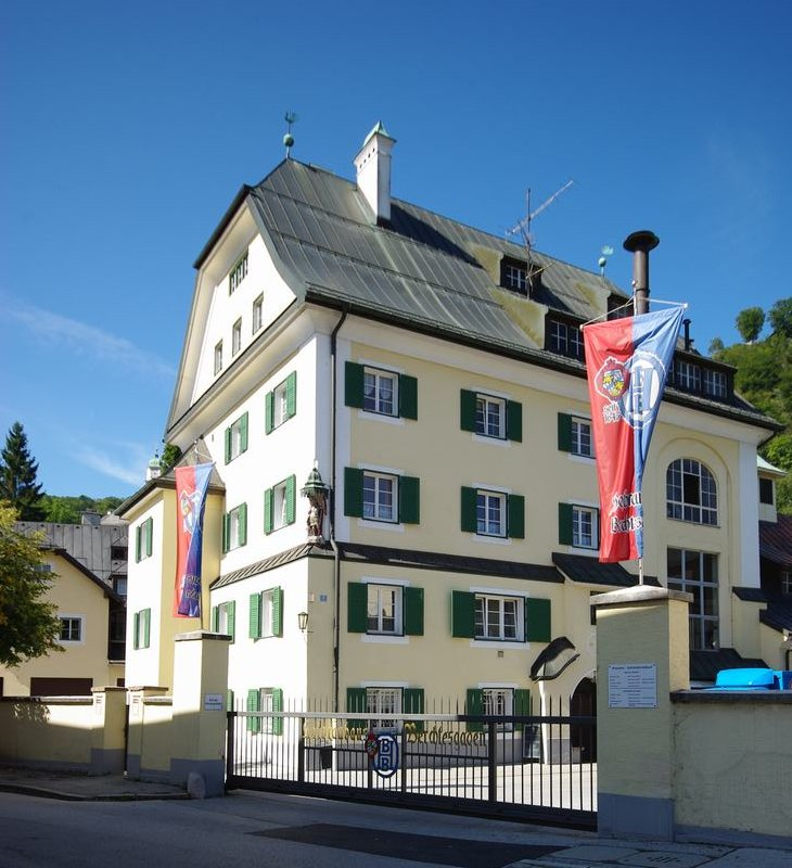 Bräuhausstr. 15, 83471 Berchtesgaden, Hofbräu Berchtesgaden, Brauhaus und VerwaltungThis is a photograph of an architectural monument.